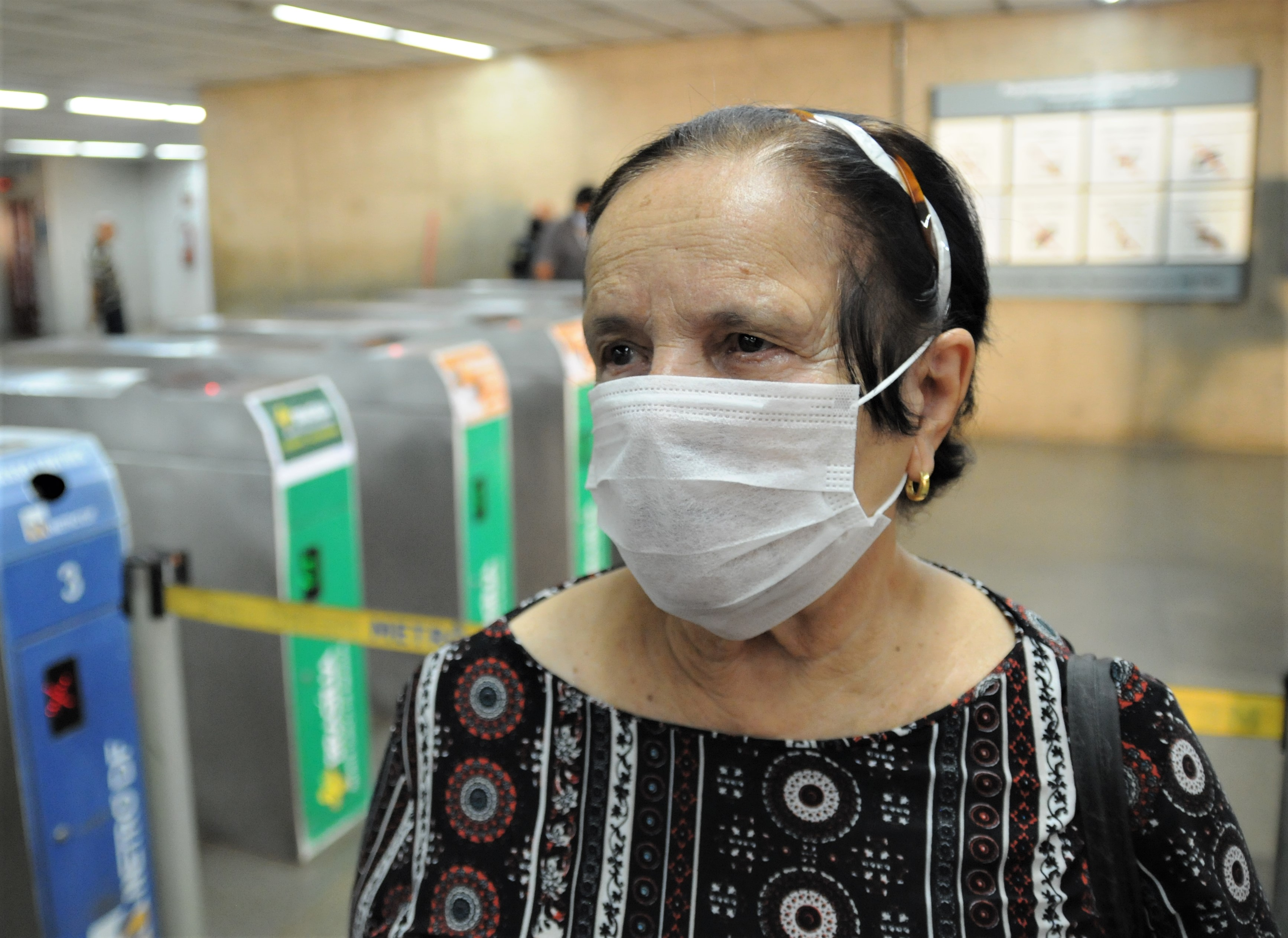 A população do Distrito Federal tem demonstrado consciência social e já utiliza máscaras para circular pelas cidades – desde que sair de casa seja absolutamente necessário. Técnicos da Secretaria de Governo, que nesta segunda-feira (4) mantiveram a distribuição gratuita dos equipamentos de proteção respiratória em terminais rodoviários e estações do metrô, garantem que 8 em cada 10 já o fazem regularmente. Na foto Leia Marta Oliveira, aposentada. Foto: Lúcio Bernardo Jr./Agência Brasília